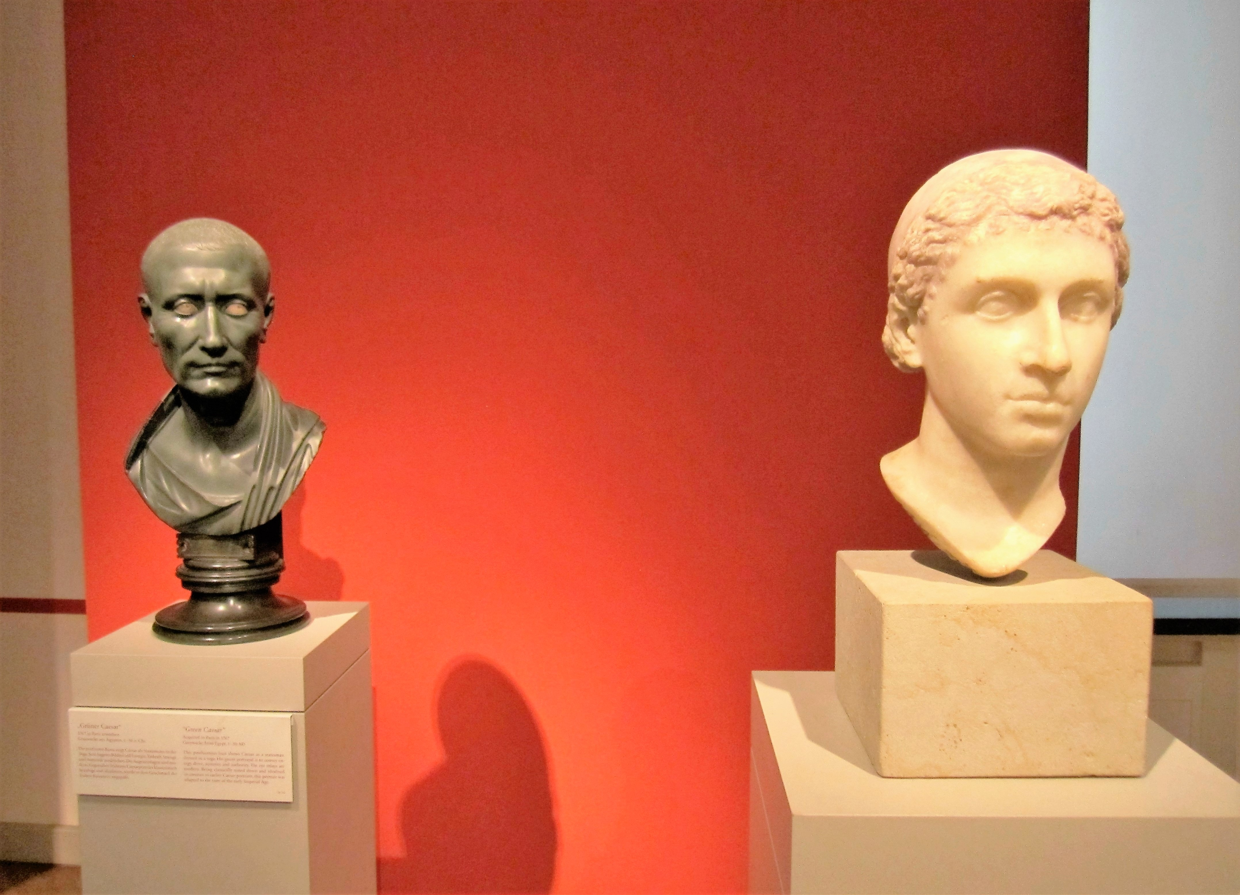 Altes Museum Berlin. Links: „Der Berliner Grüne Caesar“, Büste des Gaius Iulius Caesar aus grünem Schiefer, um 1. Jahrhundert n. Chr. - Rechts: Büste der Kleopatra.